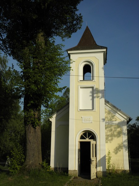 Manušice - kaple Nanebevstoupení Páně, čelní pohled, 2018